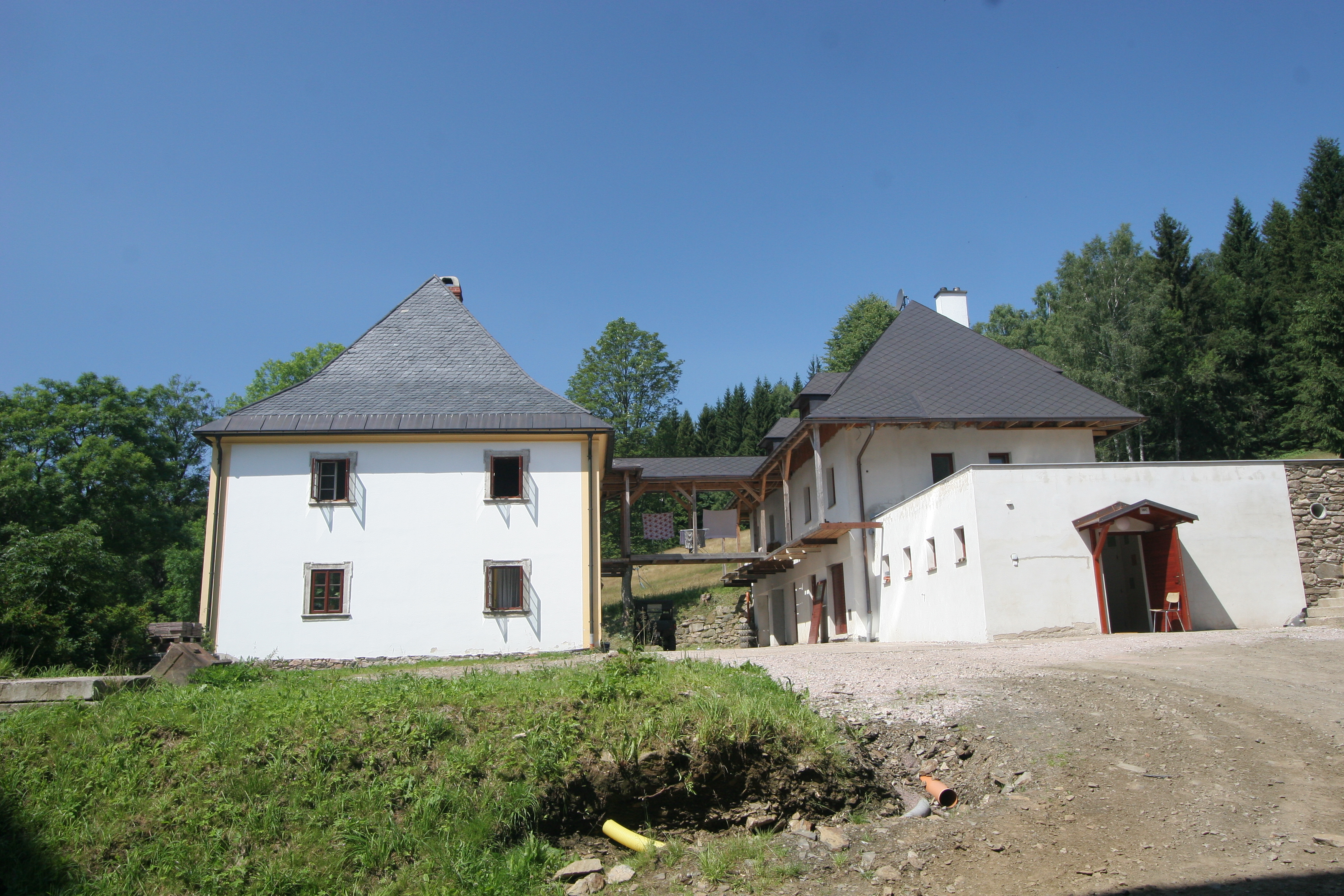 Fara, Neratov 83